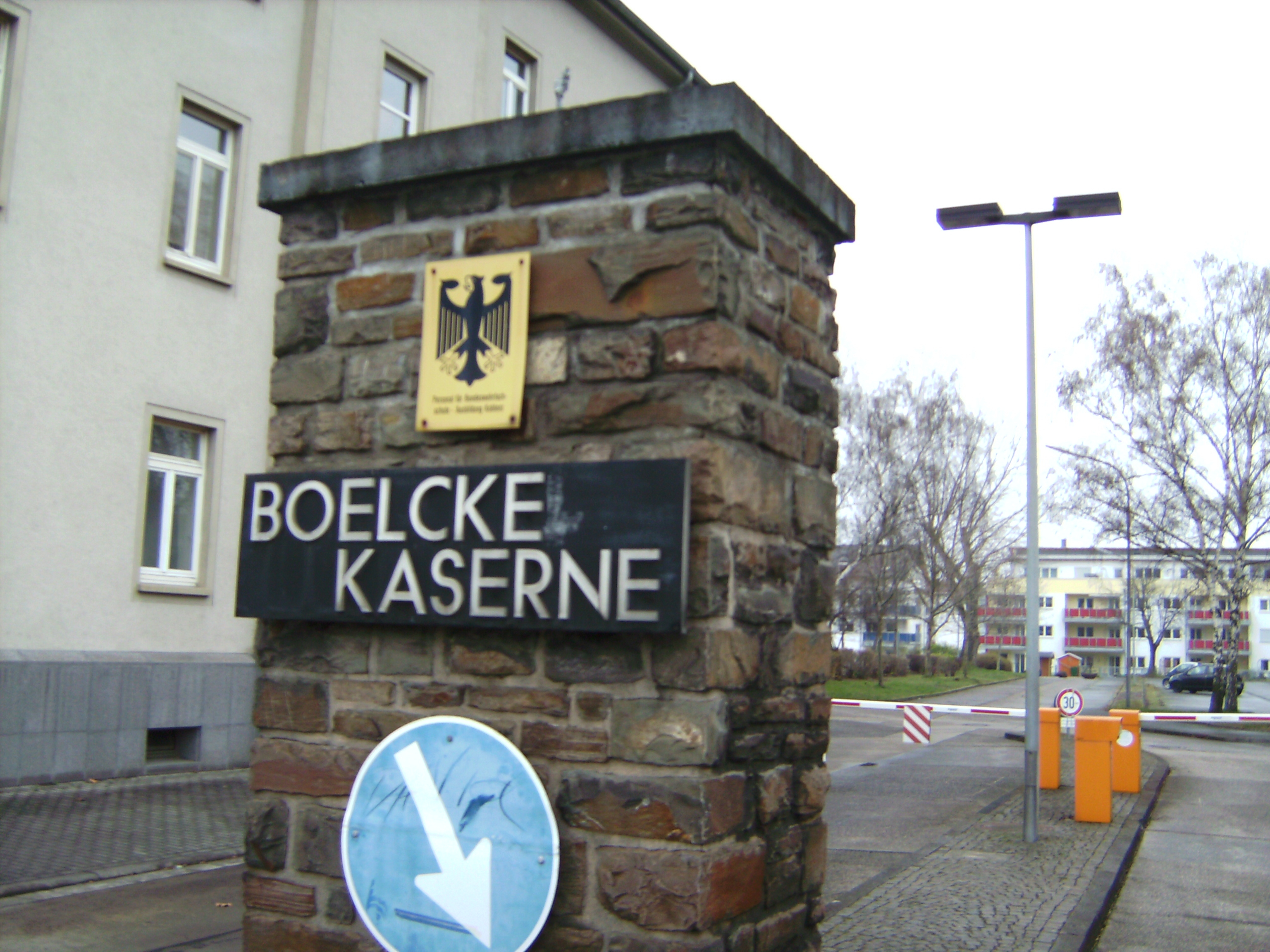 Einfahrt Boelcke-Kaserne in Koblenz